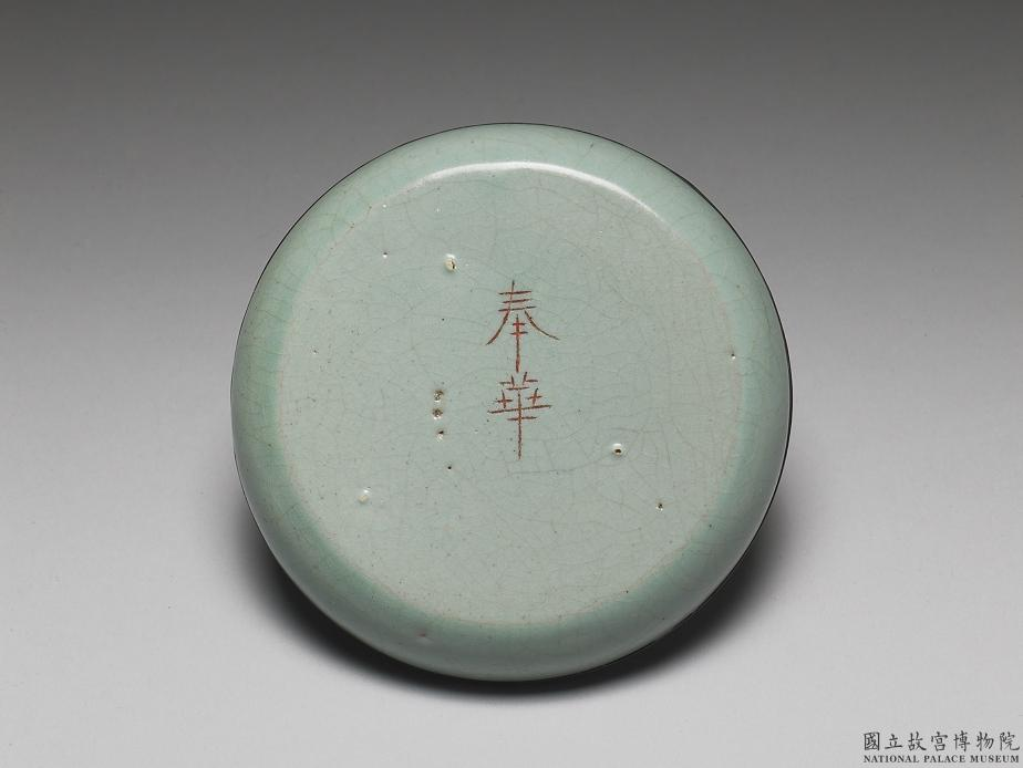 中文（中国大陆）: 北宋汝窑青瓷洗（“奉华”铭）底部